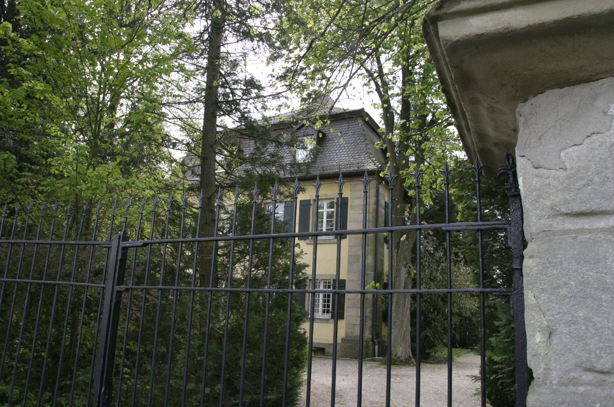 Neues Schloß, zweigeschossiger Mansarddachbau mit Mittelrisalit, Altan und Ecklisenen, 1763-65 Bayerische Denkmalliste D-5-75-117-16